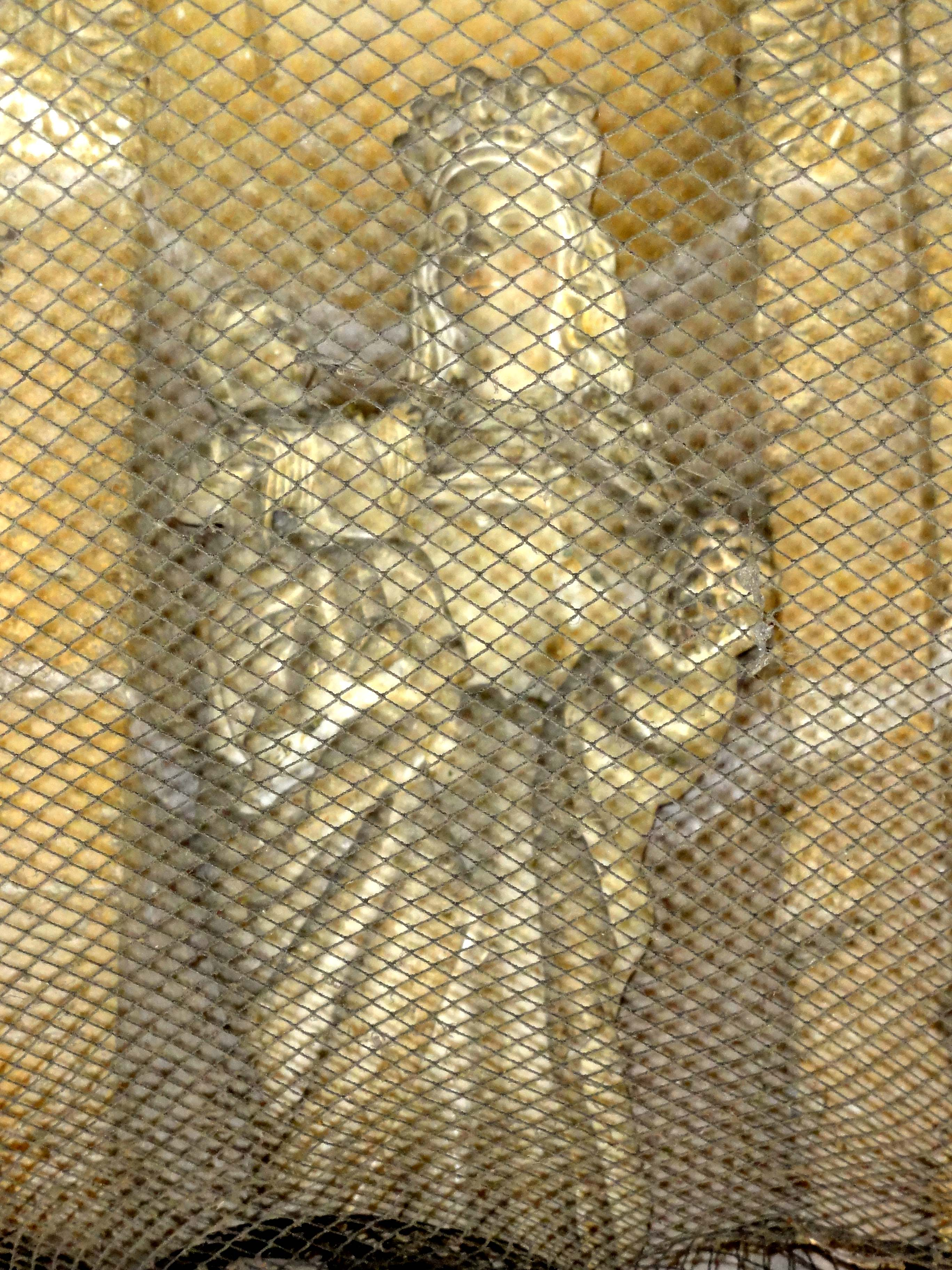 Mobilier de l'église (voir titre).